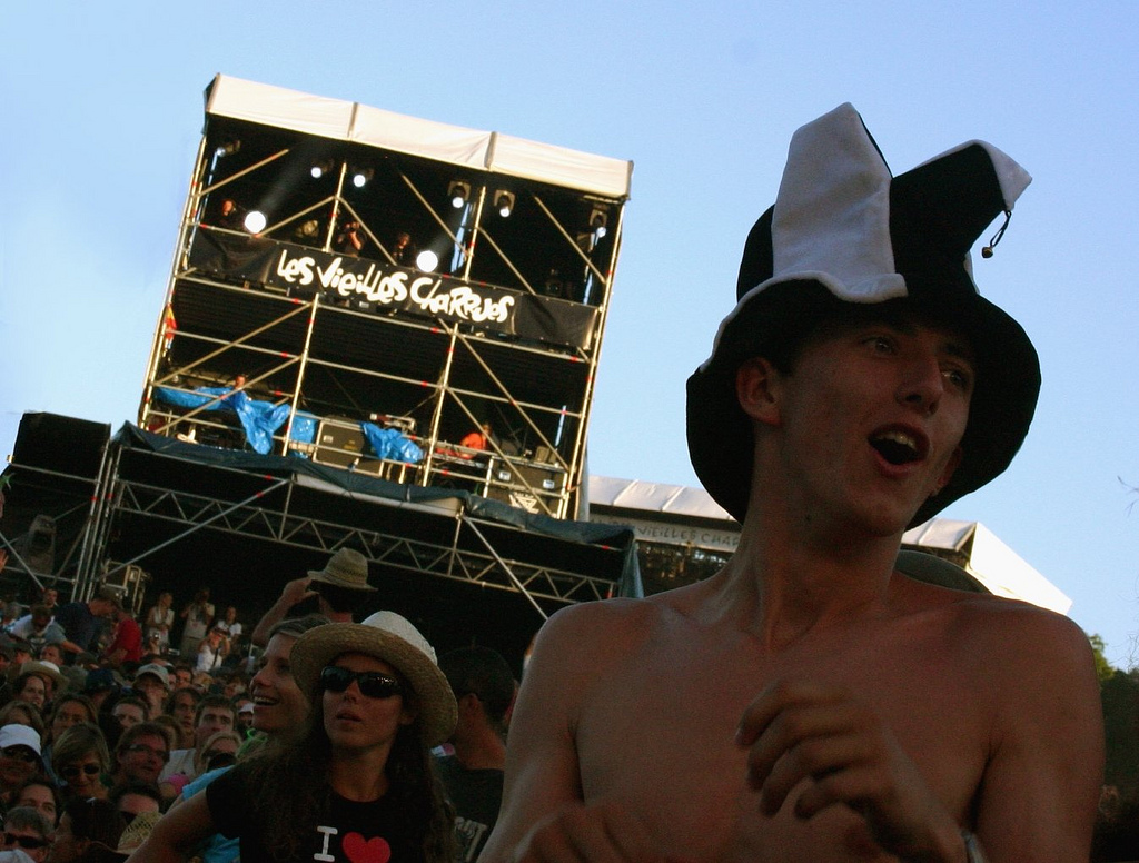 Public du festival des Vieilles Charrues au concert de -M- en 2010